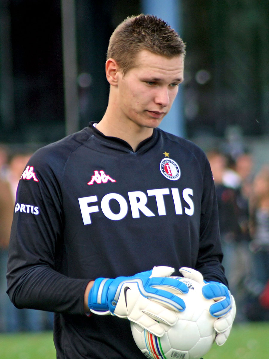 Erwin Mulder (Feyenoord)